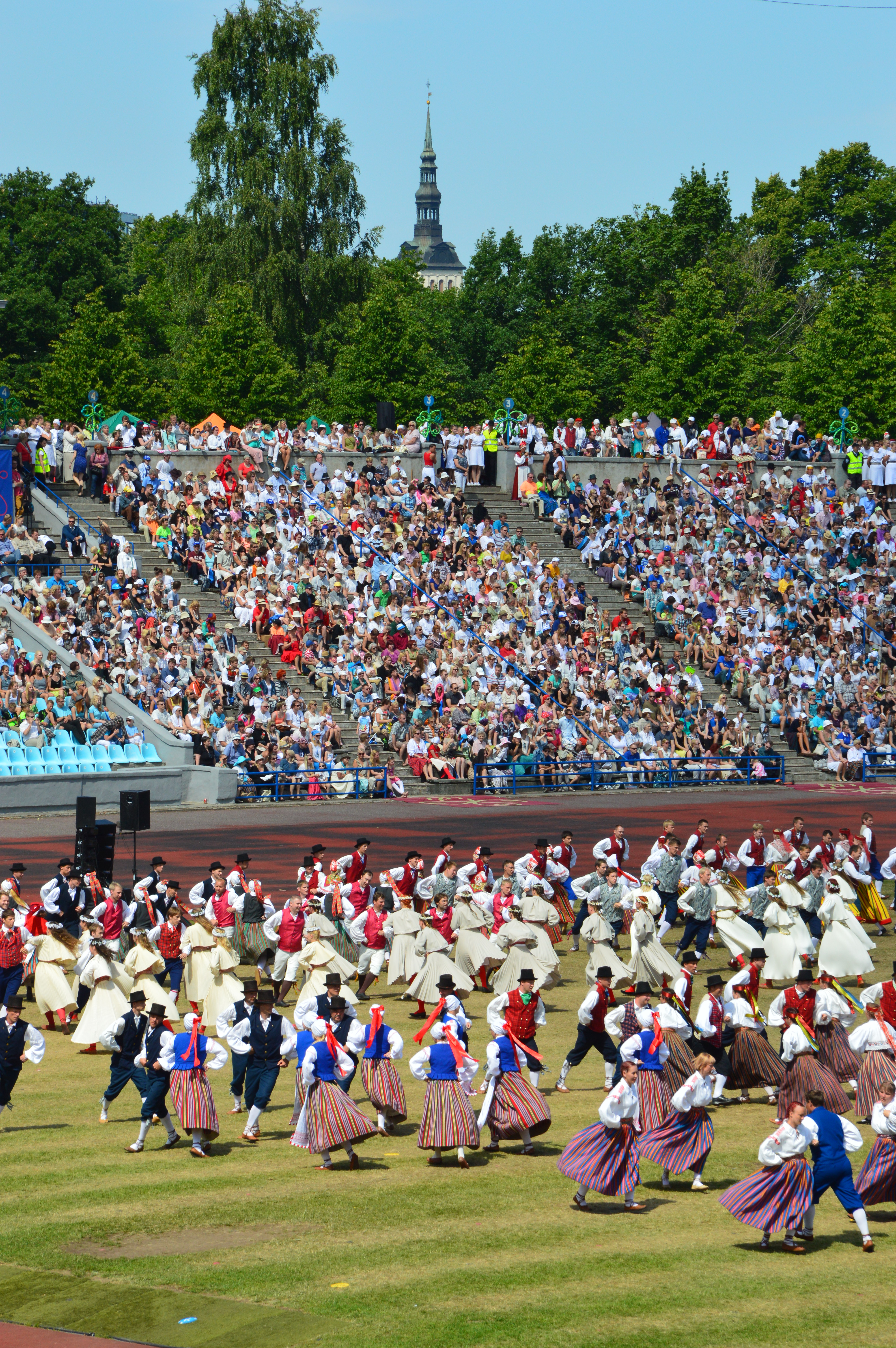 XIX üldtantsupidu Kalevi keskstaadionil.